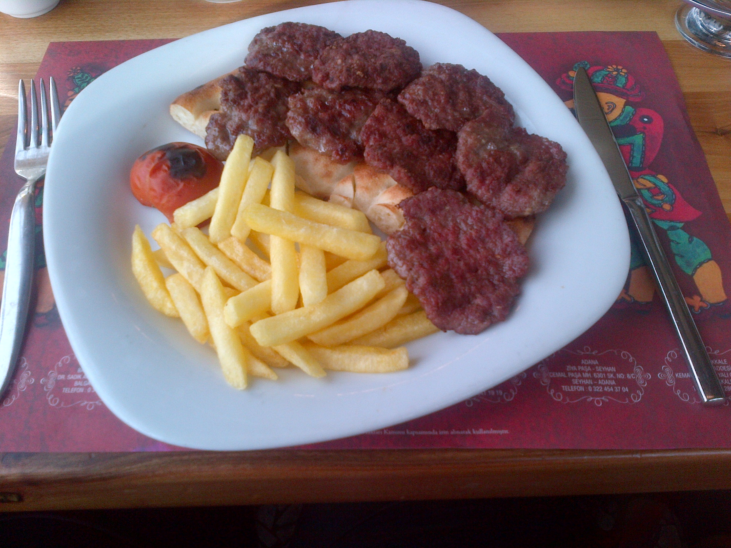 Tuerkischer Koefte mit Fritten